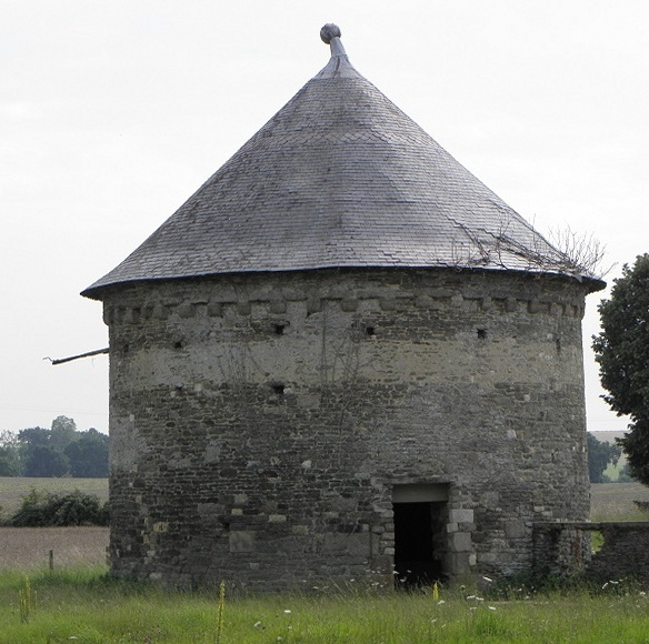 Colombier du prieuré d'Ardevon (50).